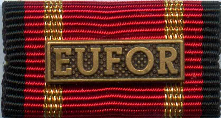 Bandschnalle Einsatzmedaille der Bundeswehr EUFOR